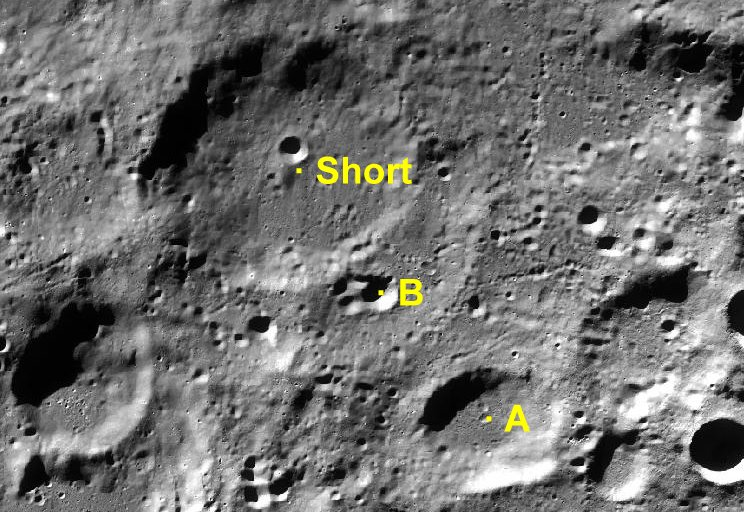 Cráter lunar Short. Cráteres satélite. (Imagen LRO)